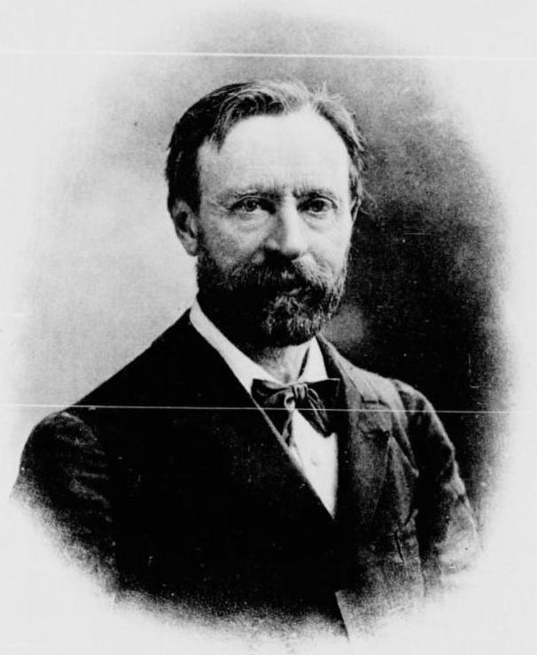 Portait d'Alfred Fouillée, par Nadar, gravure Heliog Dujardin.